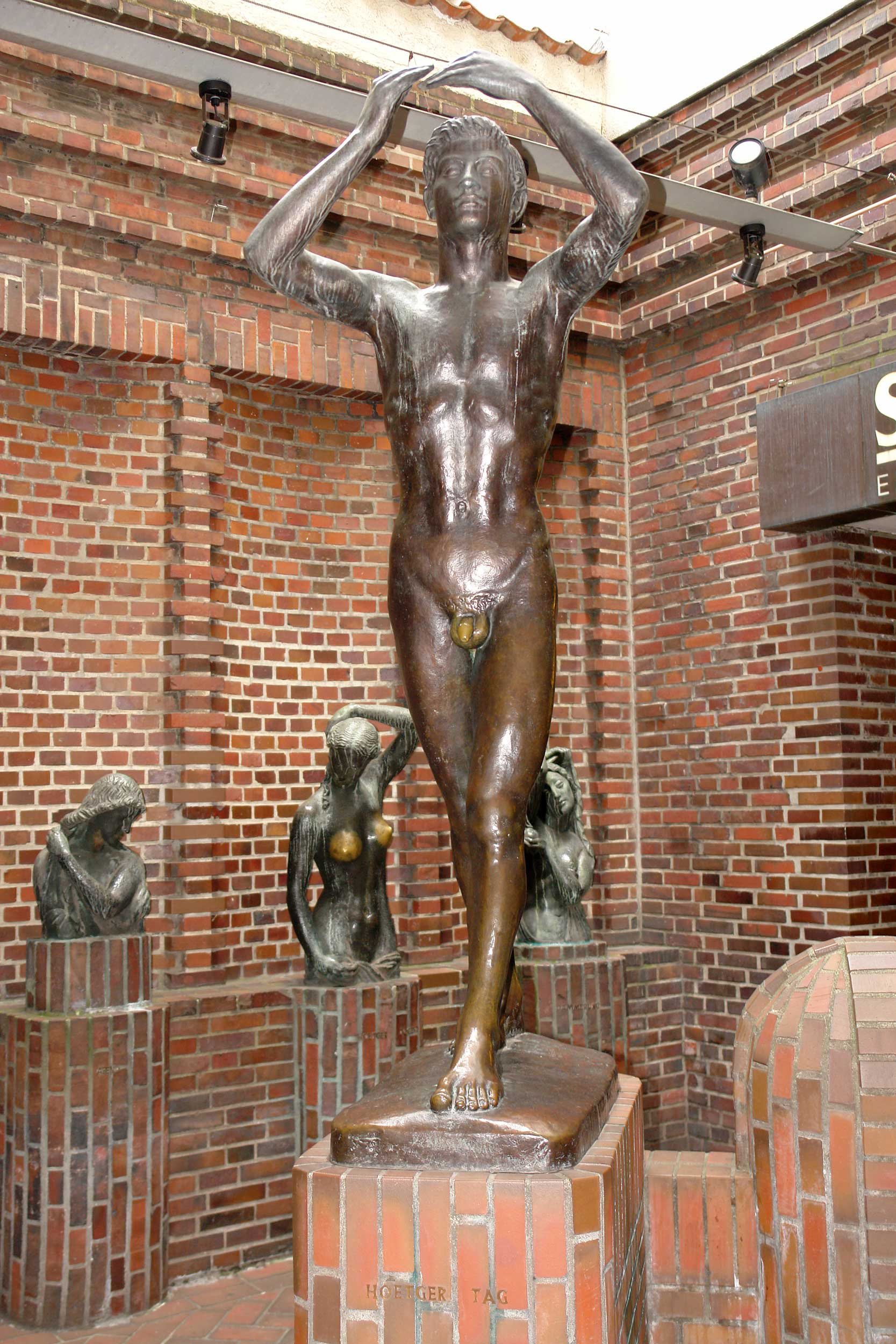 Bernhard Hoetger: Tag. Standort: Hoetger-Hof in der Bremer Böttcherstraße Das abgebildete Objekt ist ein geschütztes Kulturdenkmal in der Freien Hansestadt Bremen, mit der Nr. 1500,T003 beim Landesamt für Denkmalpflege registriert.